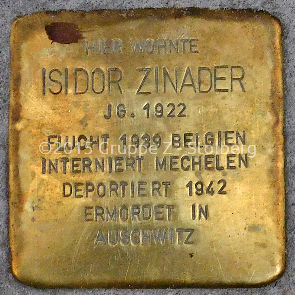 Stolperstein für Isidor Zinader verlegt am 18. Dezember 2015